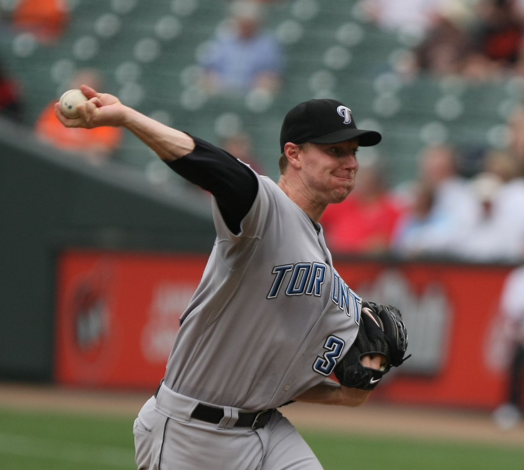 Roy Halladay